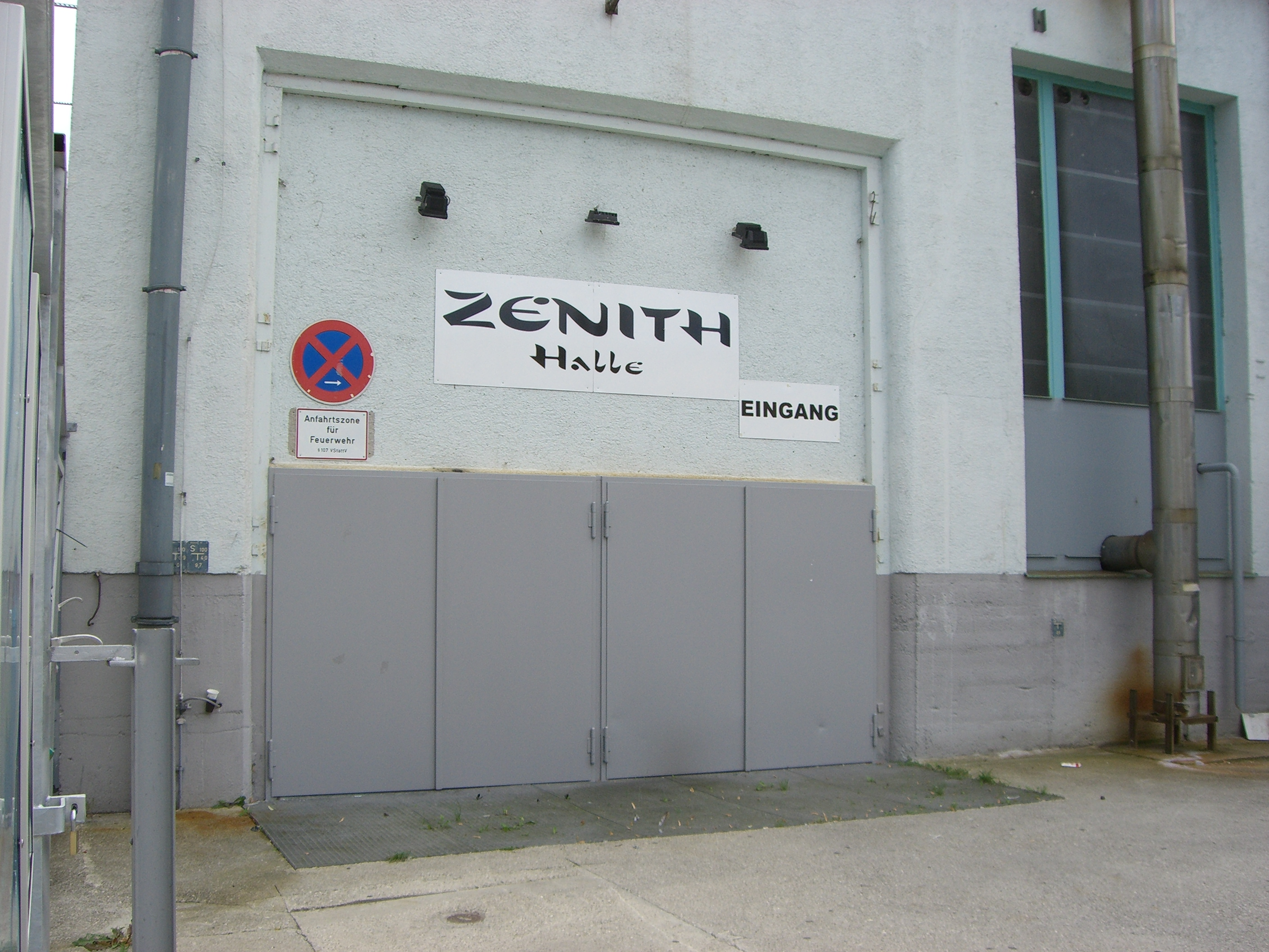 München - Zenith (Eingang).jpg